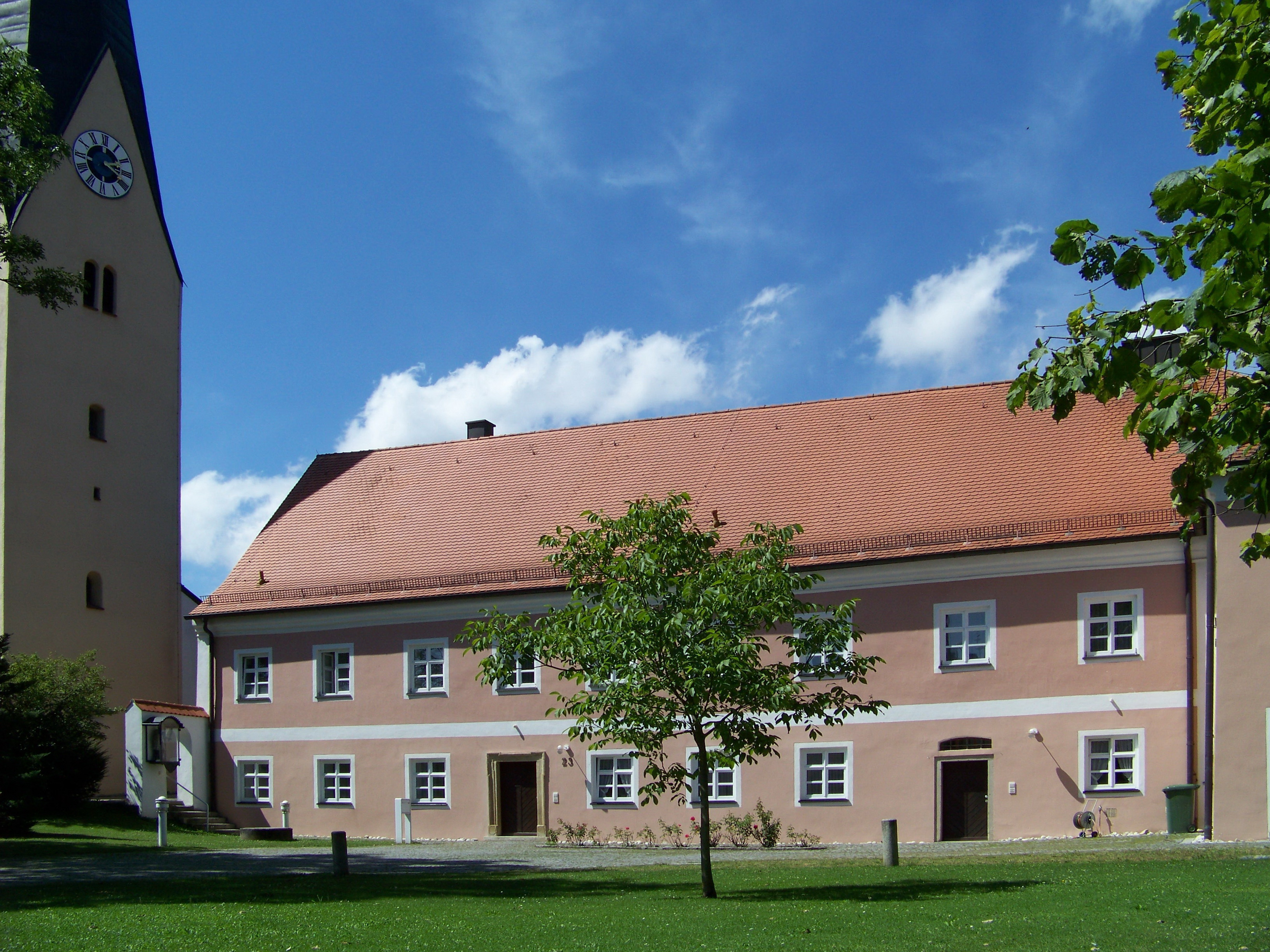 Pfakofen, Dorfstraße 23. Pfarrhof, zweigeschossiger Satteldachbau mit Halbwalm, über hakenförmigem Grundriss, 18. Jahrhundert.